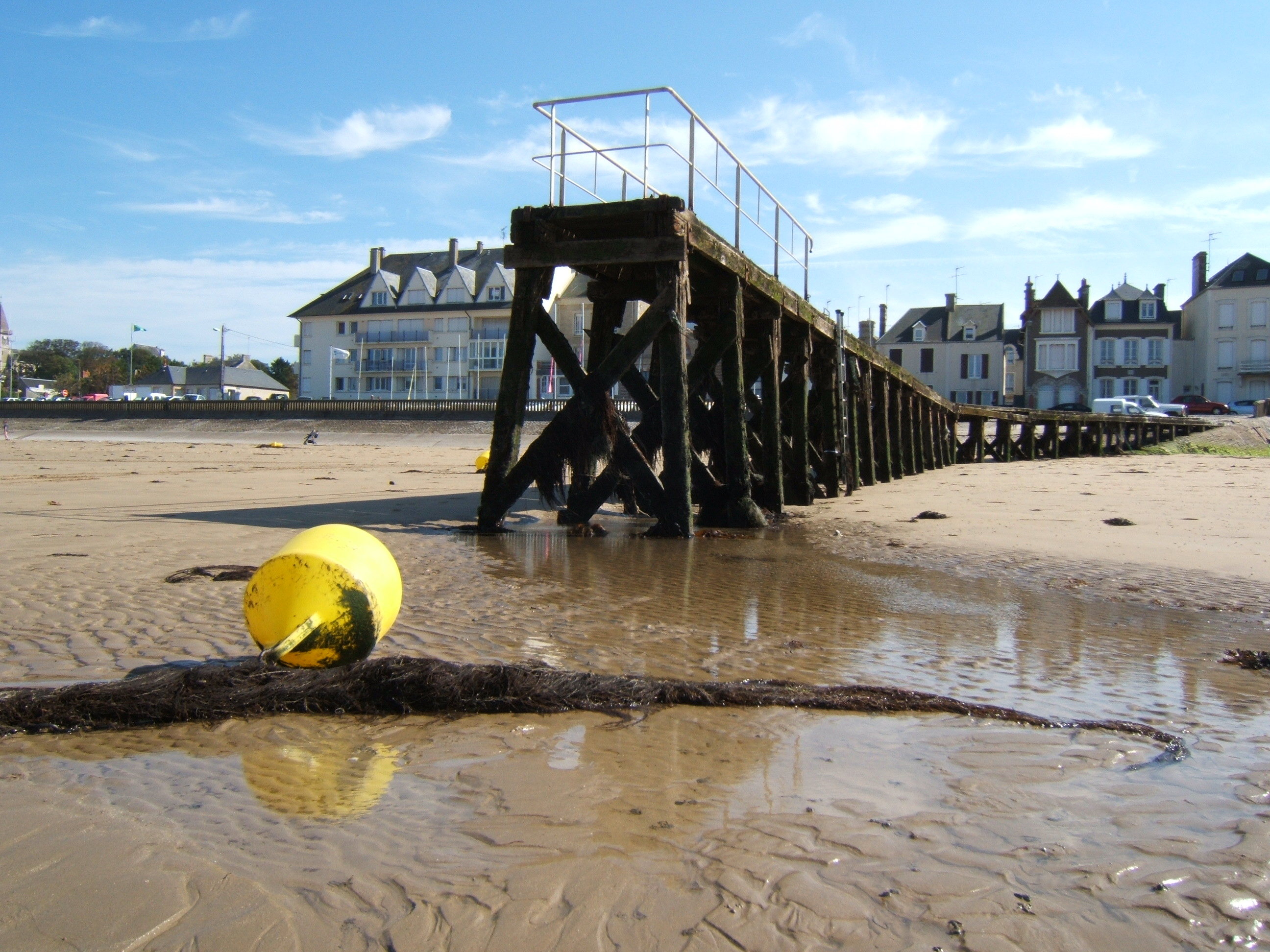 Petite jetée à l'est de la plage de Grandcamps dans le Calvados.